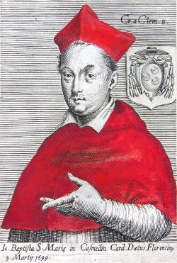 Cardinale Giovanni Battista Deti